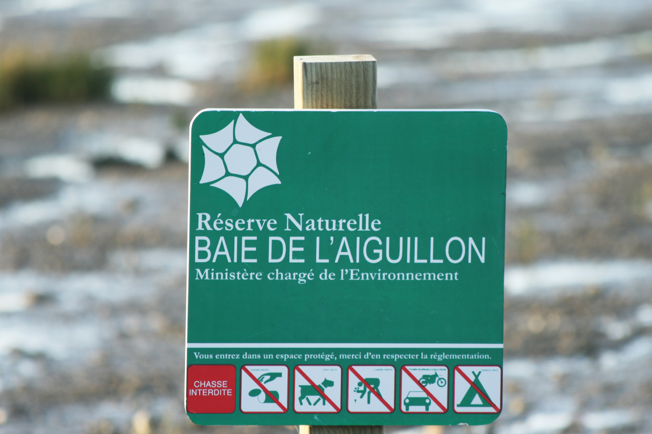 Panneau de la reserve naturelle baie de l'Aiguillon